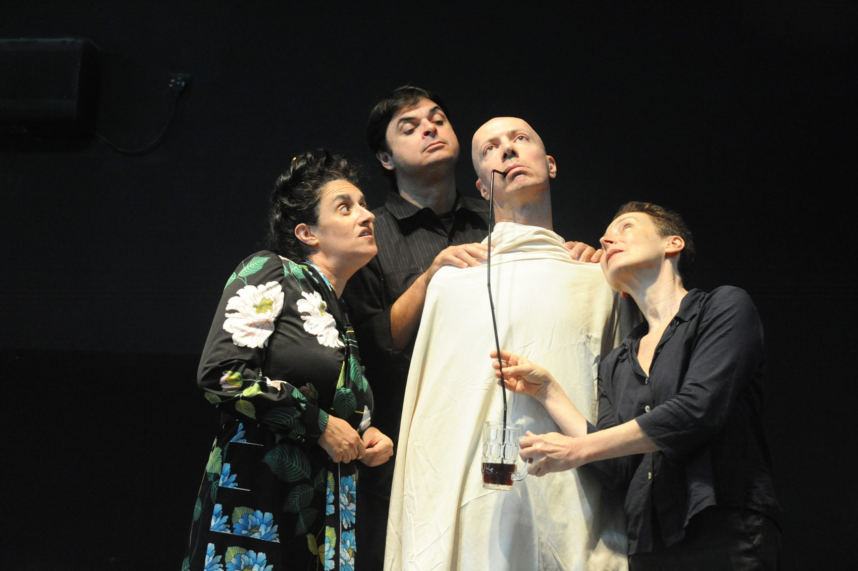 מימין לשמאל: דינה בליי-שור, יוסי טולדו, דוד קיגלר ופלורנס בלוך, בהצגה "קיגלר: חייו ומותו", מאת ובבימויו של עודד ליפשיץ, תיאטרון אנסמבל הרצליה, 2012